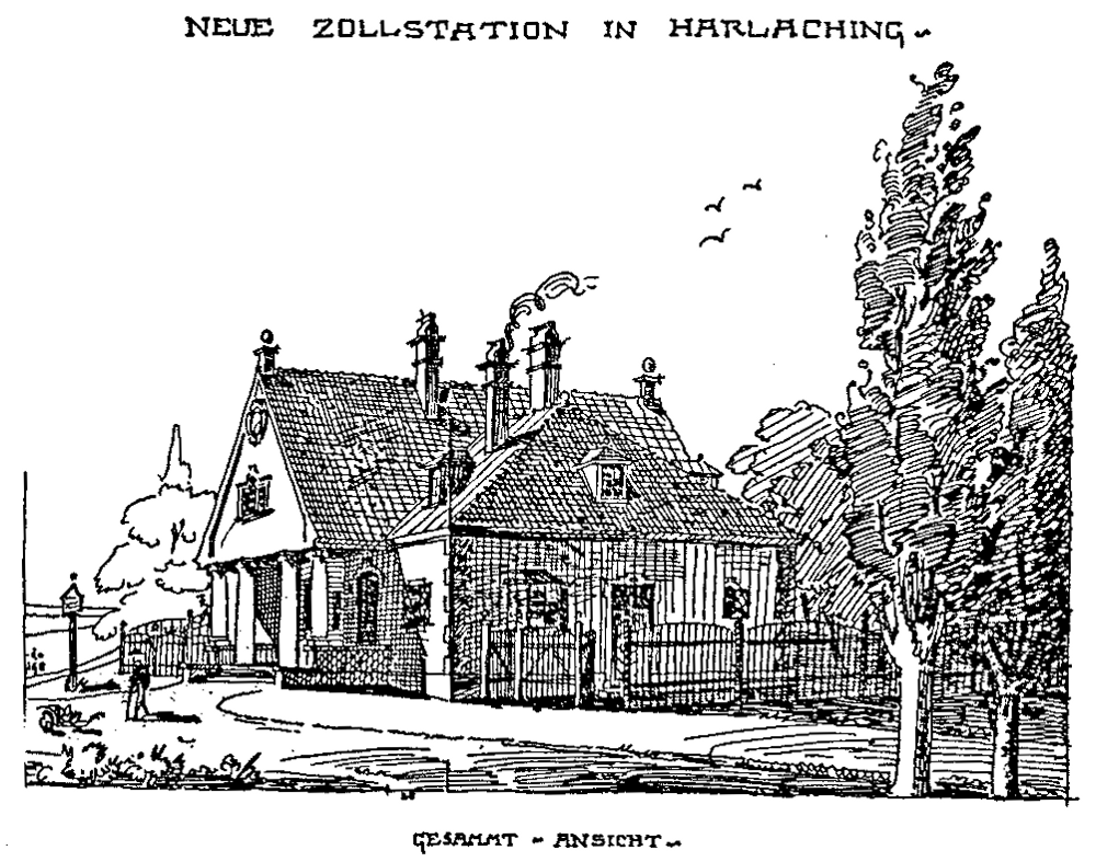 Zollstation Harlaching, heute: Geiselgasteigstraße 1, erbaut 1894 von Hans Grässel. Zeichnung von Grässel aus den Bauunterlagen